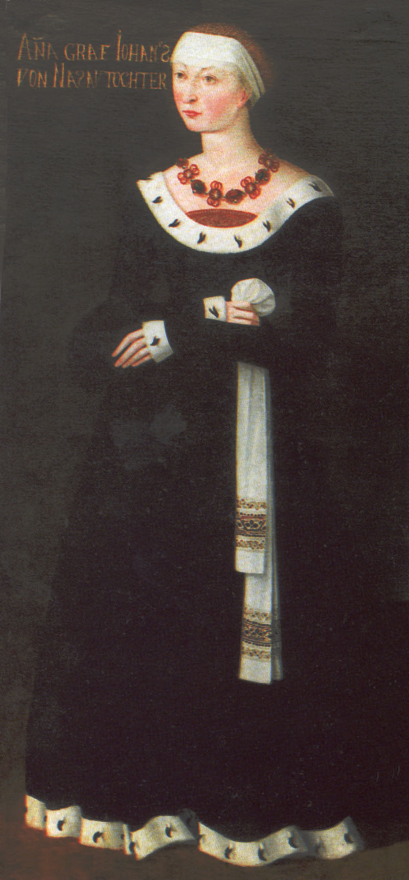 Anna von Nassau-Dillenburg (1441-1515), Herzogin von Braunschweig und letzte Gräfin von Katzenellnbogenlabel QS:Lde,"Anna von Nassau-Dillenburg (1441-1515), Herzogin von Braunschweig und letzte Gräfin von Katzenellnbogen"